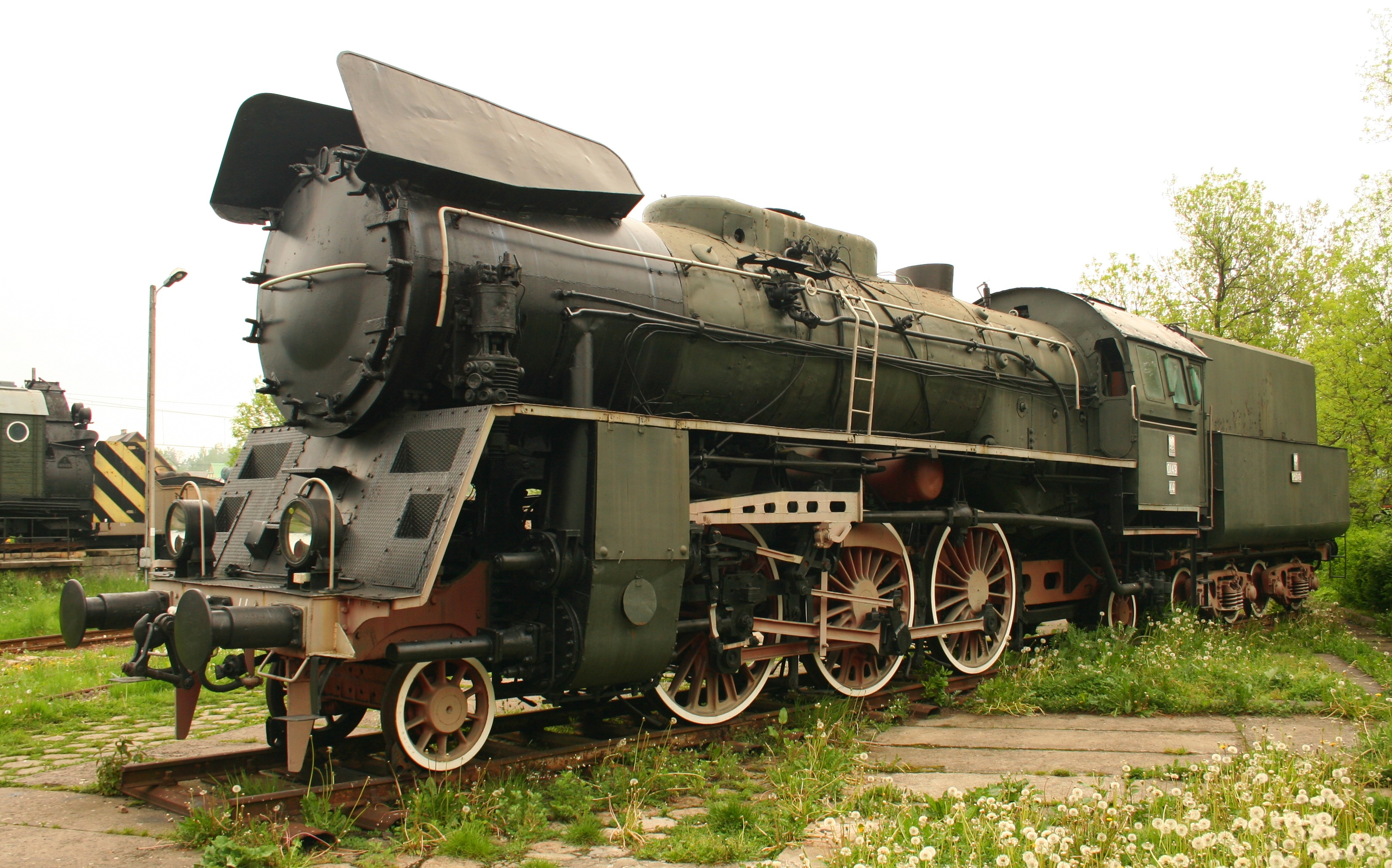 Polska lokomotywa Ol49-44, skansen taboru kolejowego w Chabówce